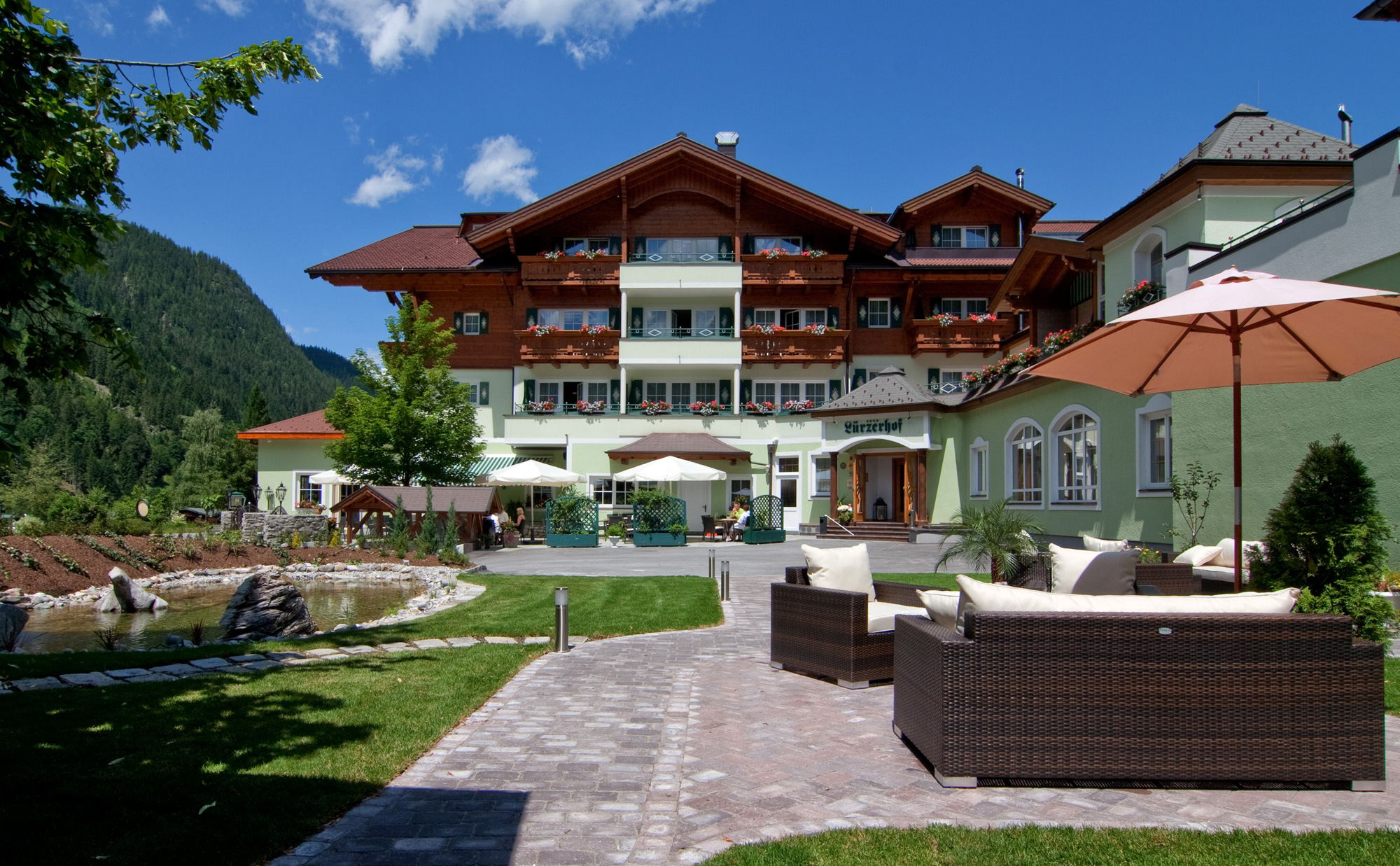 Das Wellnesshotel Lürzerhof in Untertauern - Obertauern im Jahre 2011